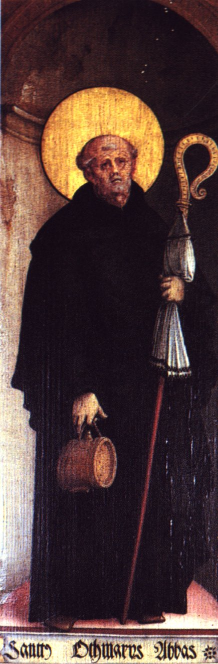 Ausstattung der ehemaligen Seitenaltäre der Meßkircher St. Martinskirche, Standflügel: Heiliger Othmar von Sankt Gallen Eingescannt aus: Anna Moraht-Fromm und Hans Westhoff: Der Meister von Meßkirch – Forschungen zur südwestdeutschen Malerei des 16. Jahrhunderts, Ulm, 1997, S. 202, links